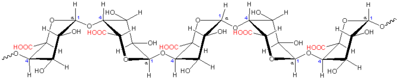 Acide Polygalacturonique. wiki allemande